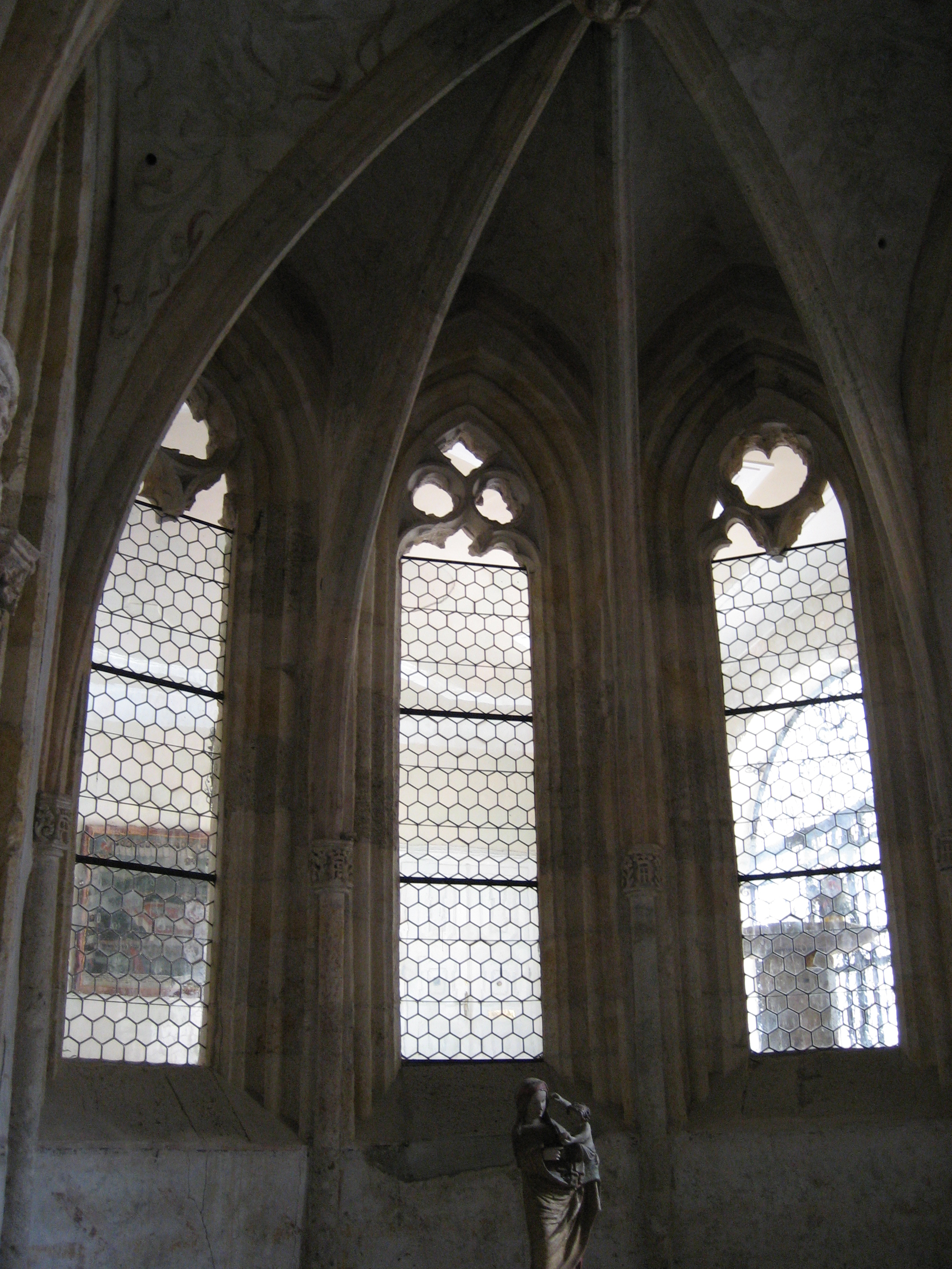 Stift Rein (in der Nähe von Graz, Österreich), gotische Kapelle